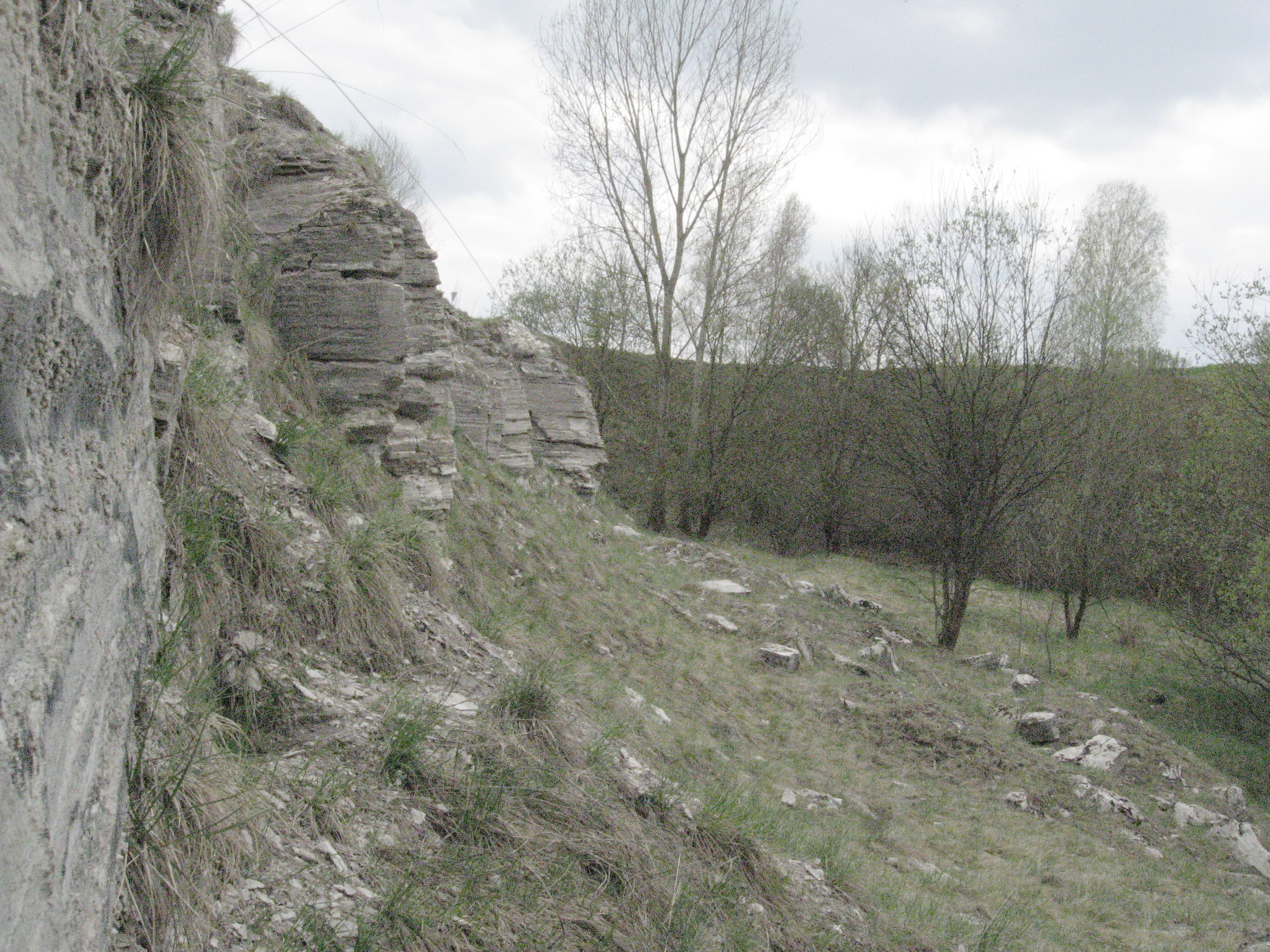 Abbaukante im aufgelassenen Gipsbruch am Alten Galgenberg ca. 1 km NW der Bühlertanner Ortsmitte. Blick nach Süden.